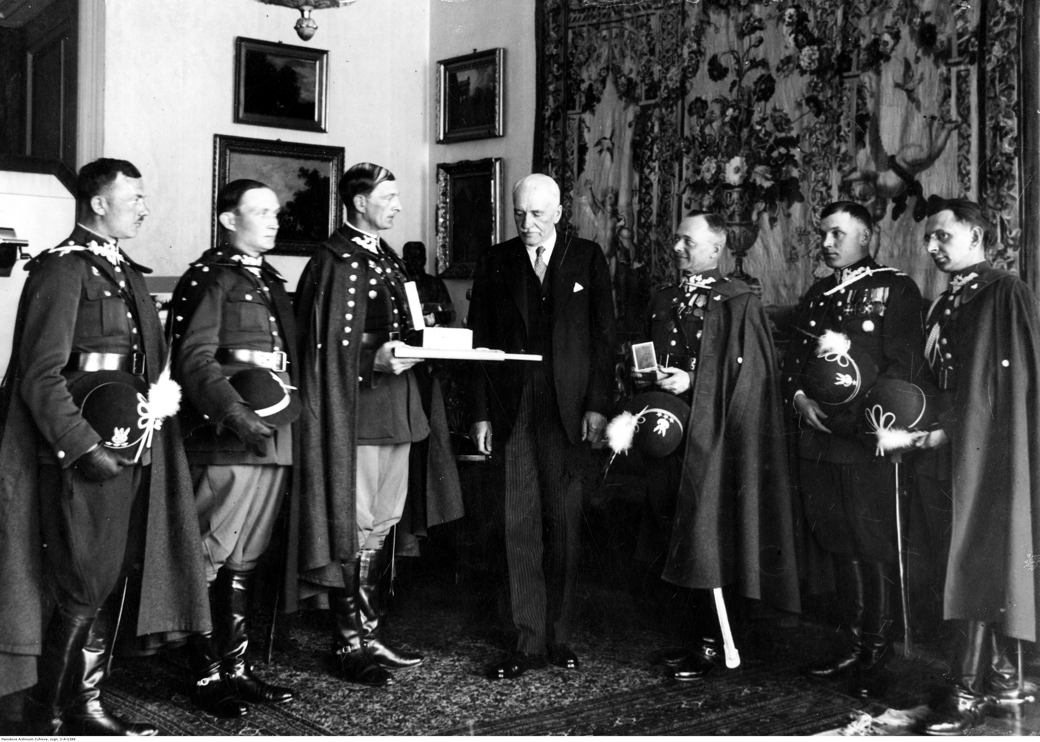 Delegacje 1 i 3 Pułku Strzelców Podhalańskich na audiencji u prezydenta RP Ignacego Mościckiego - wręczenie Prezydentowi odznak honorowych pułków. Widoczni m.in. ppłk Zygmunt Krudowski ( trzeci z lewej), ppłk Poświt (drugi z lewej), kpt. Wójcik (pierwszy z lewej), płk Zagórski (trzeci z prawej), mjr Józef Kutyba (drugi z prawej), por. Słoniewski (pierwszy z prawej). Koncern Ilustrowany Kurier Codzienny - Archiwum Ilustracji. Sygnatura: 1-A-1388